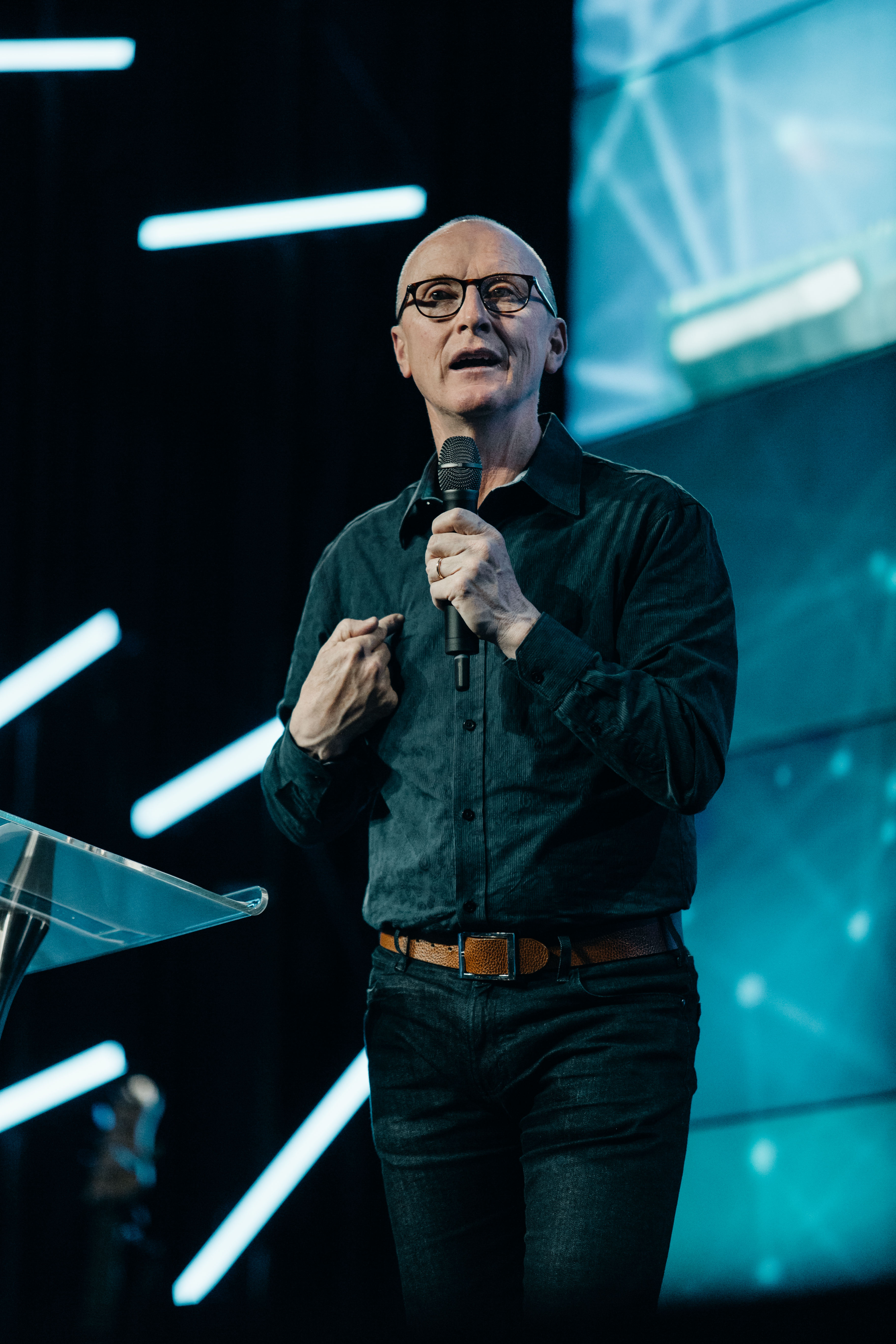 Foto historia